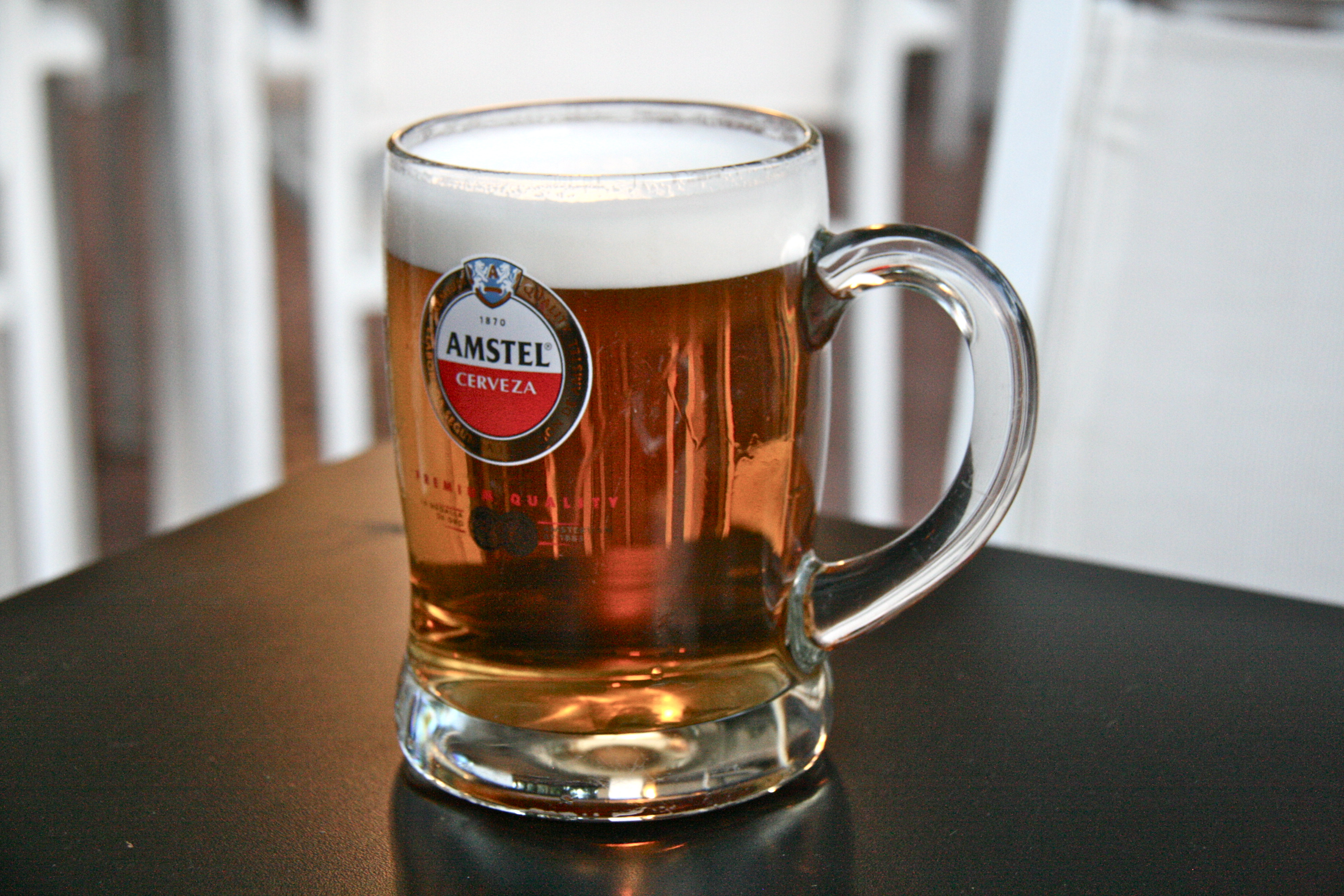 Jarra de Aguila